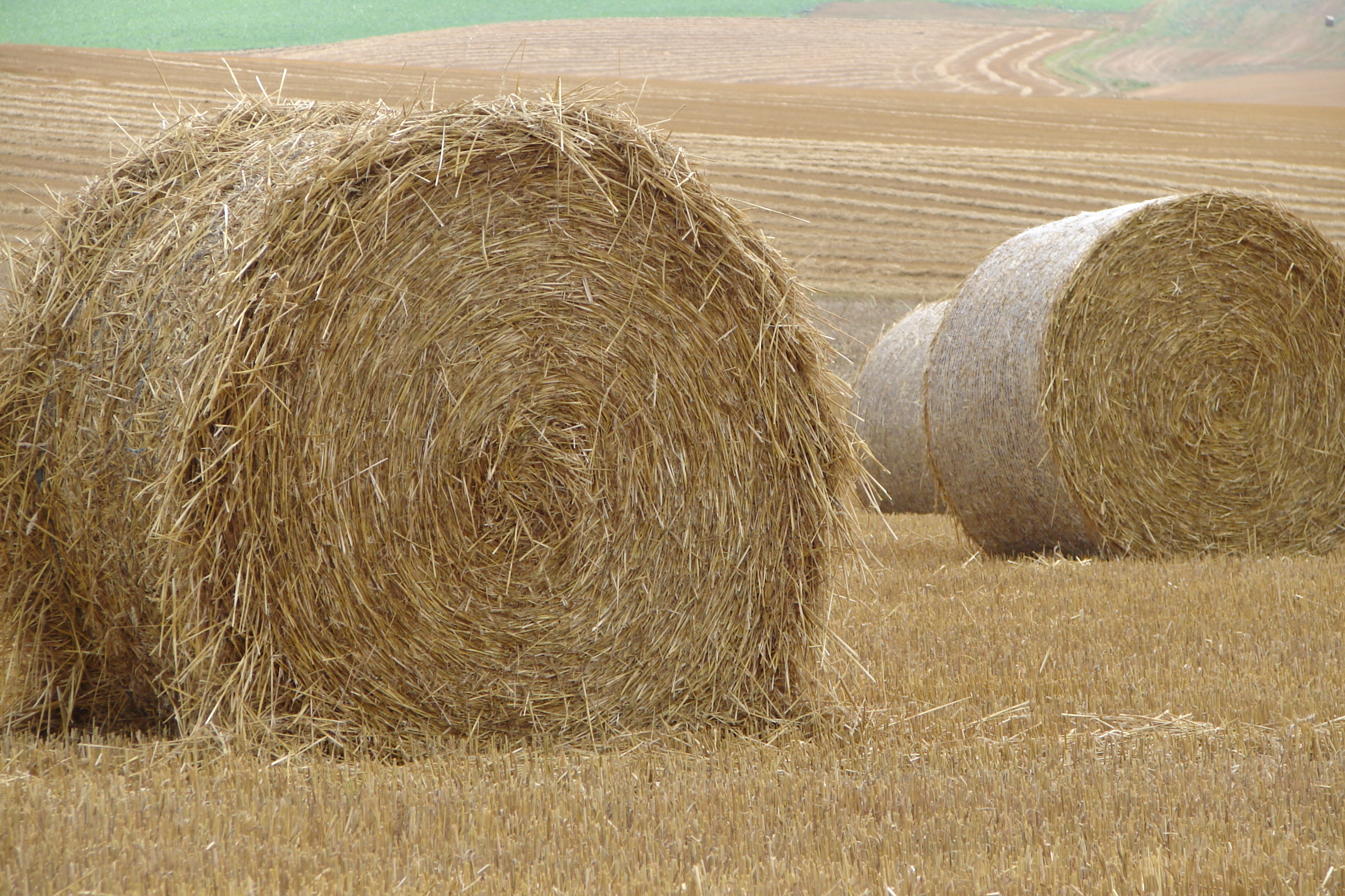 Lieu : Proix (Guise / Aisne / Picardie / France) – Bottes de paille, chaume dans les champs.